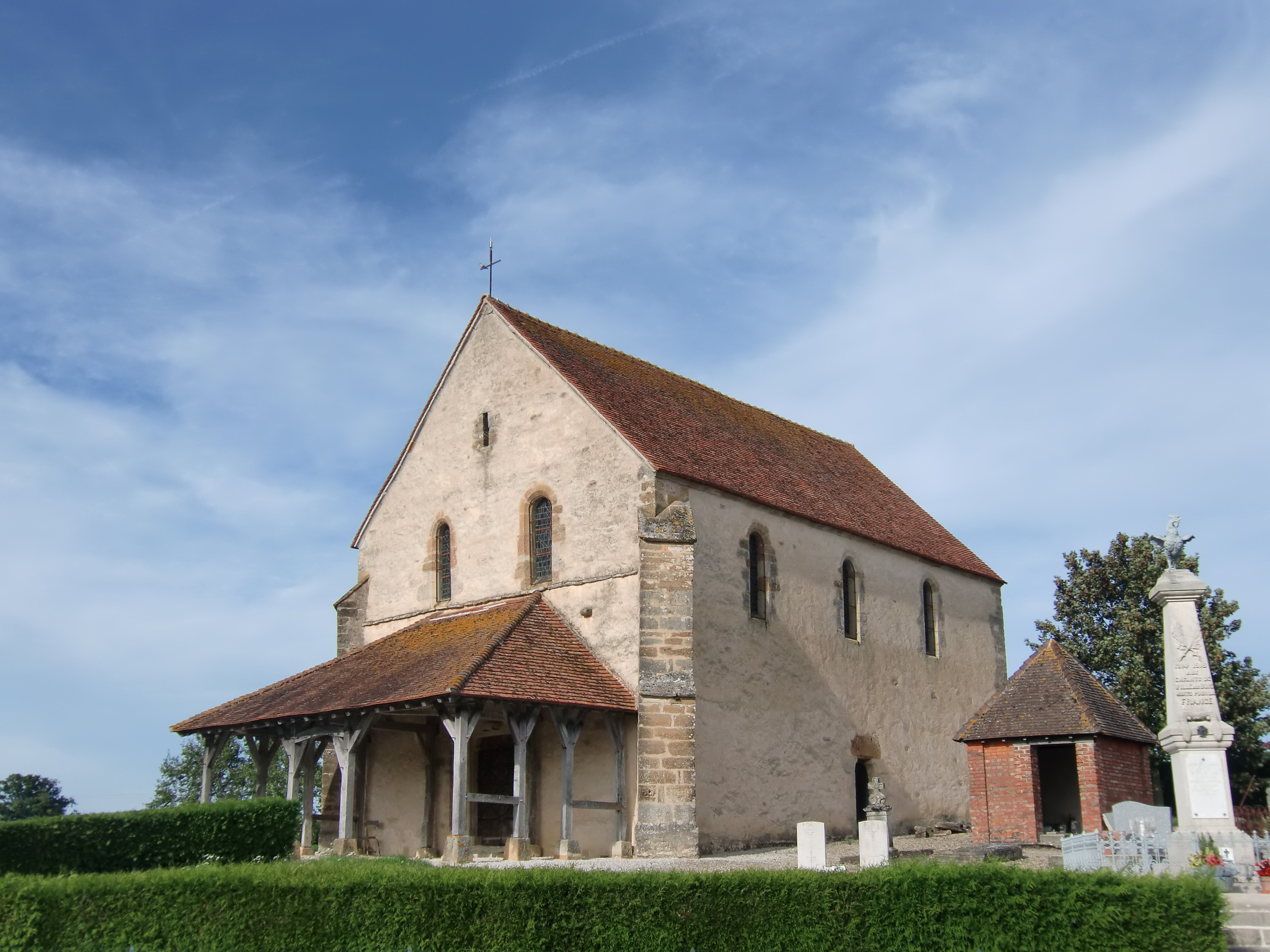 Eglise de La Ville-aux-Bois (Aube, Champagne, France)